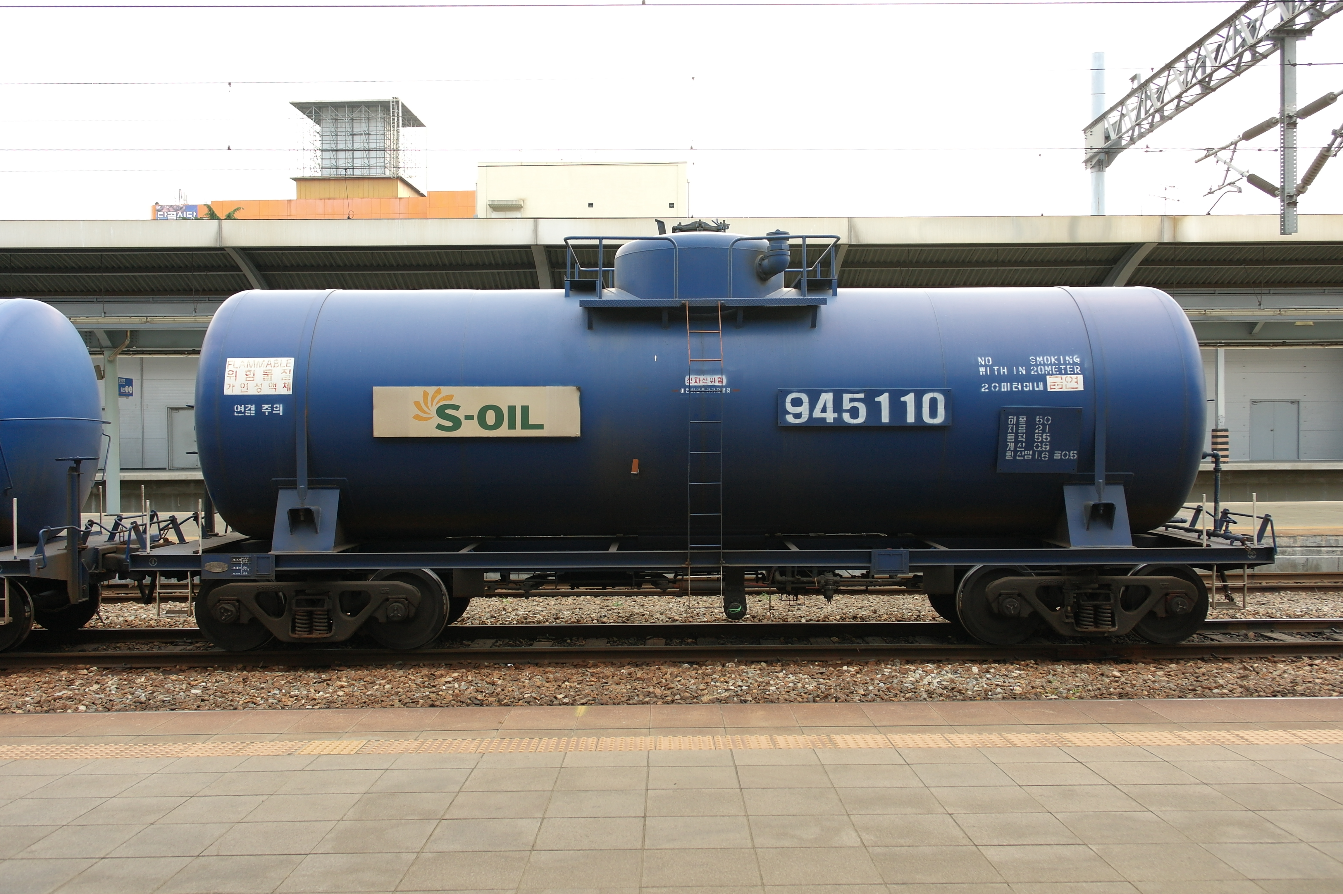 Korail sweet crude oil car